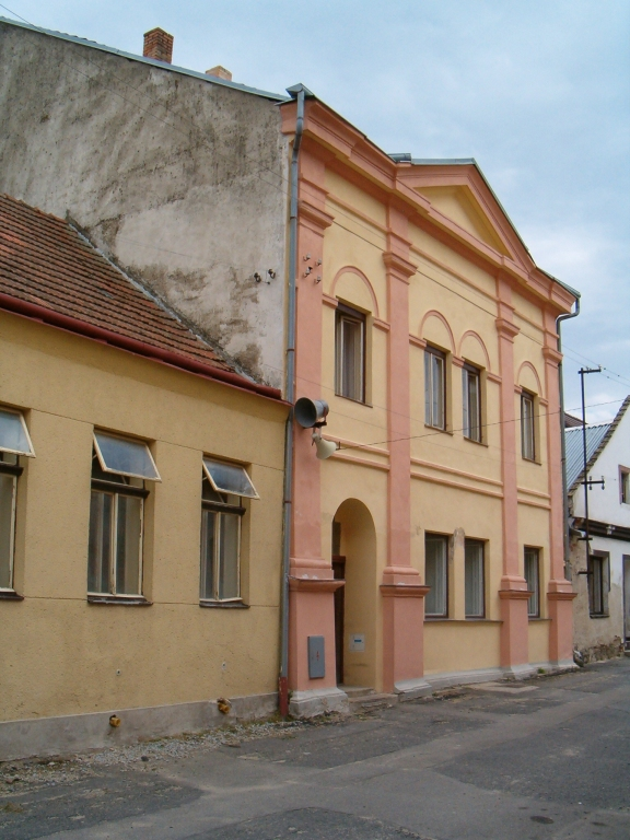 Židovská synagoga ve Slavonicích